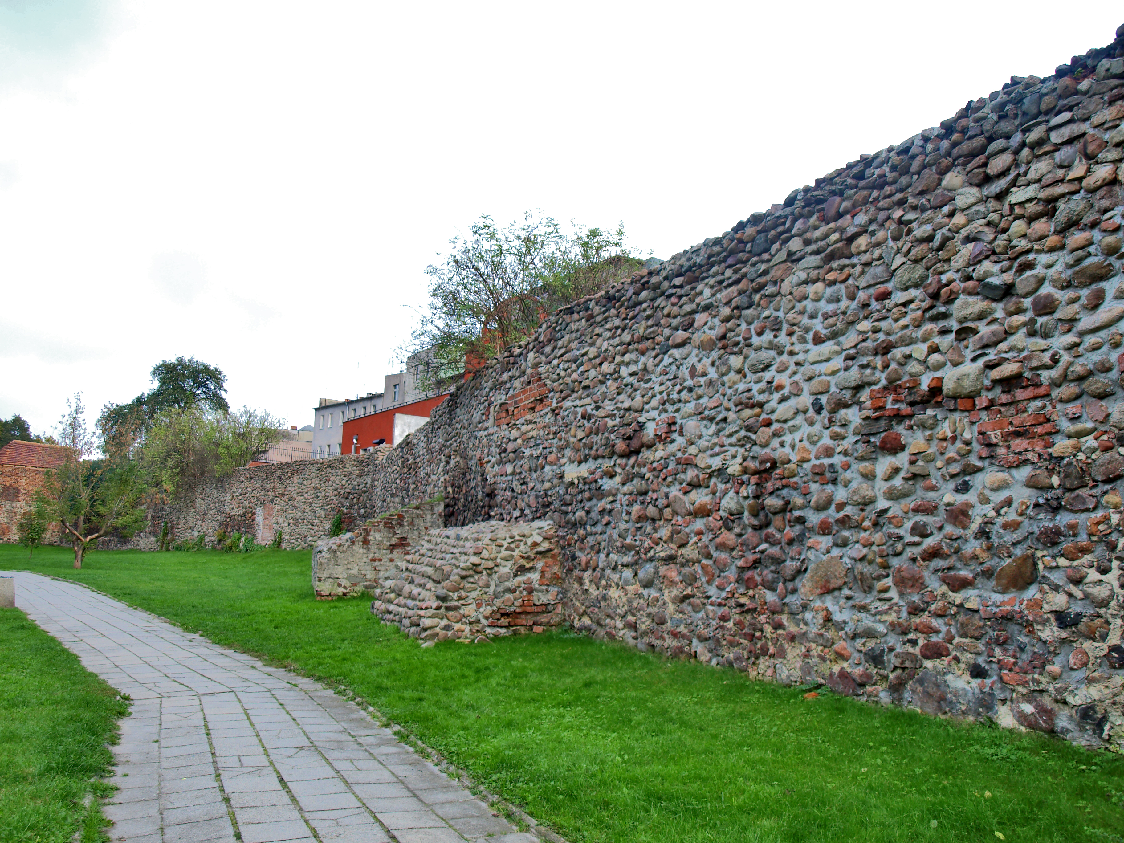 Mury obronne w Żaganiu.